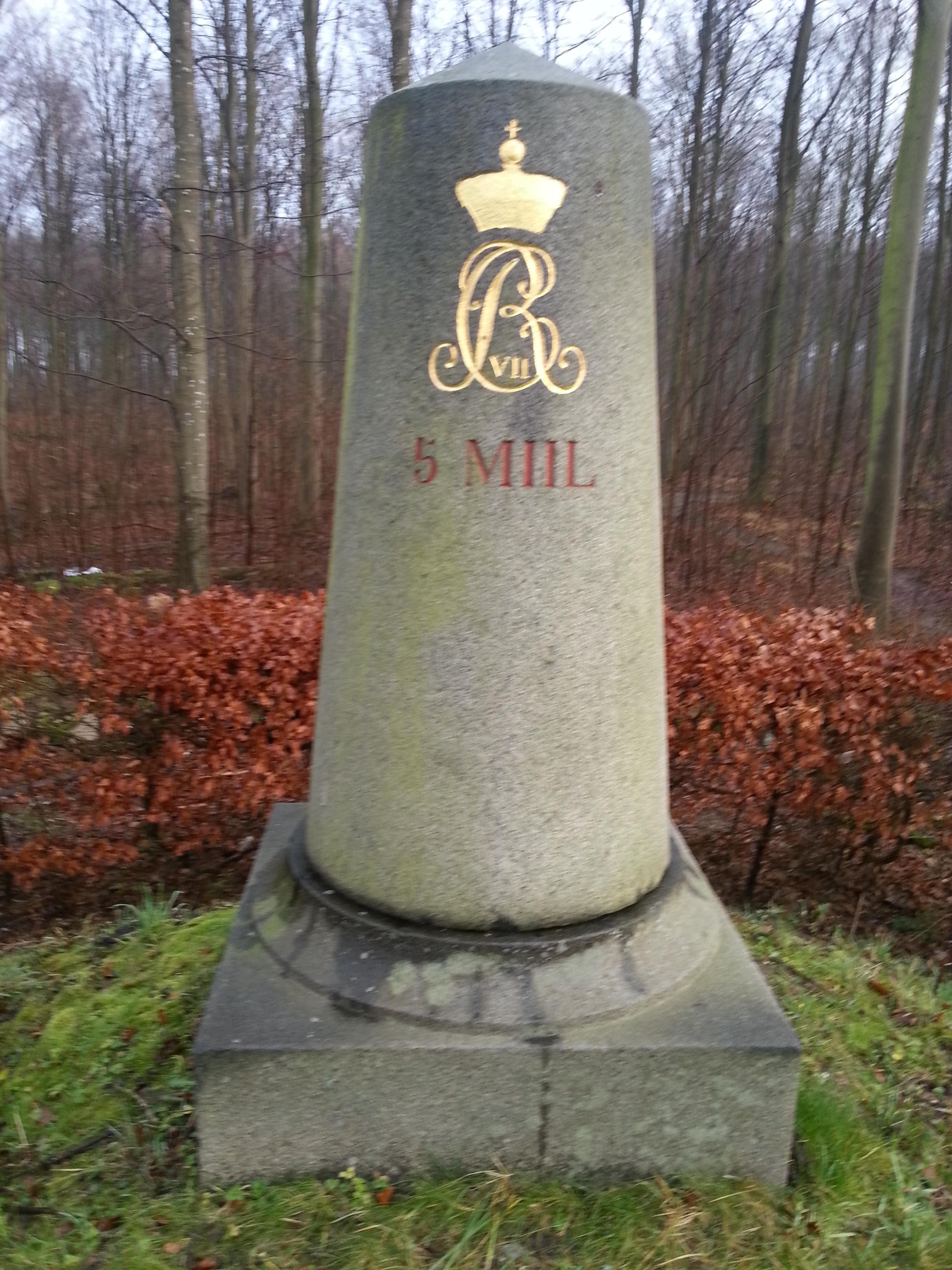 milepæl ved Kvistgaard